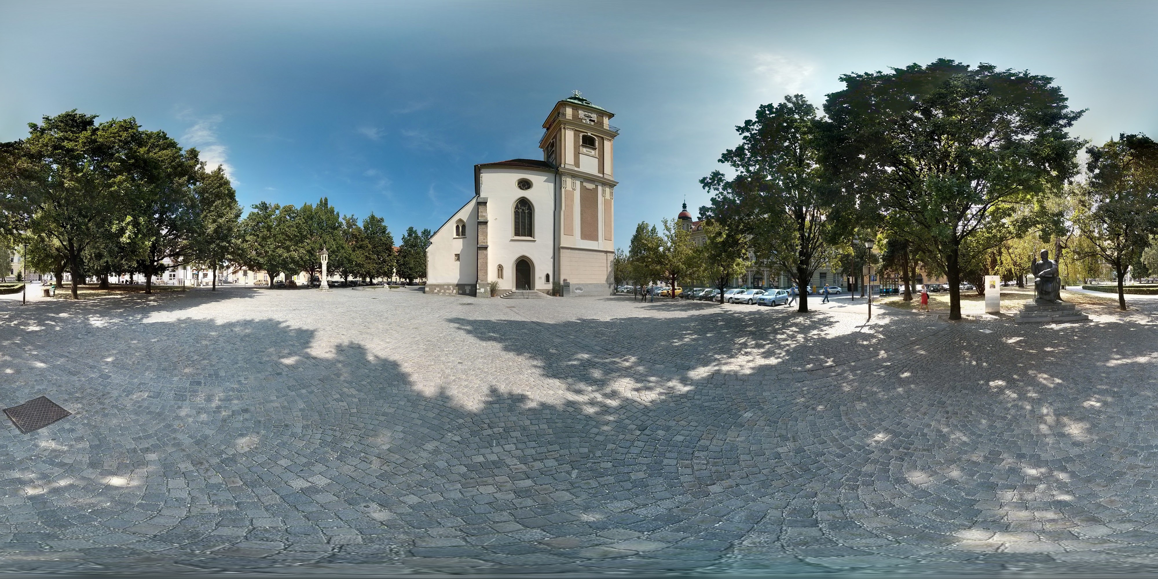 Slomskov trg